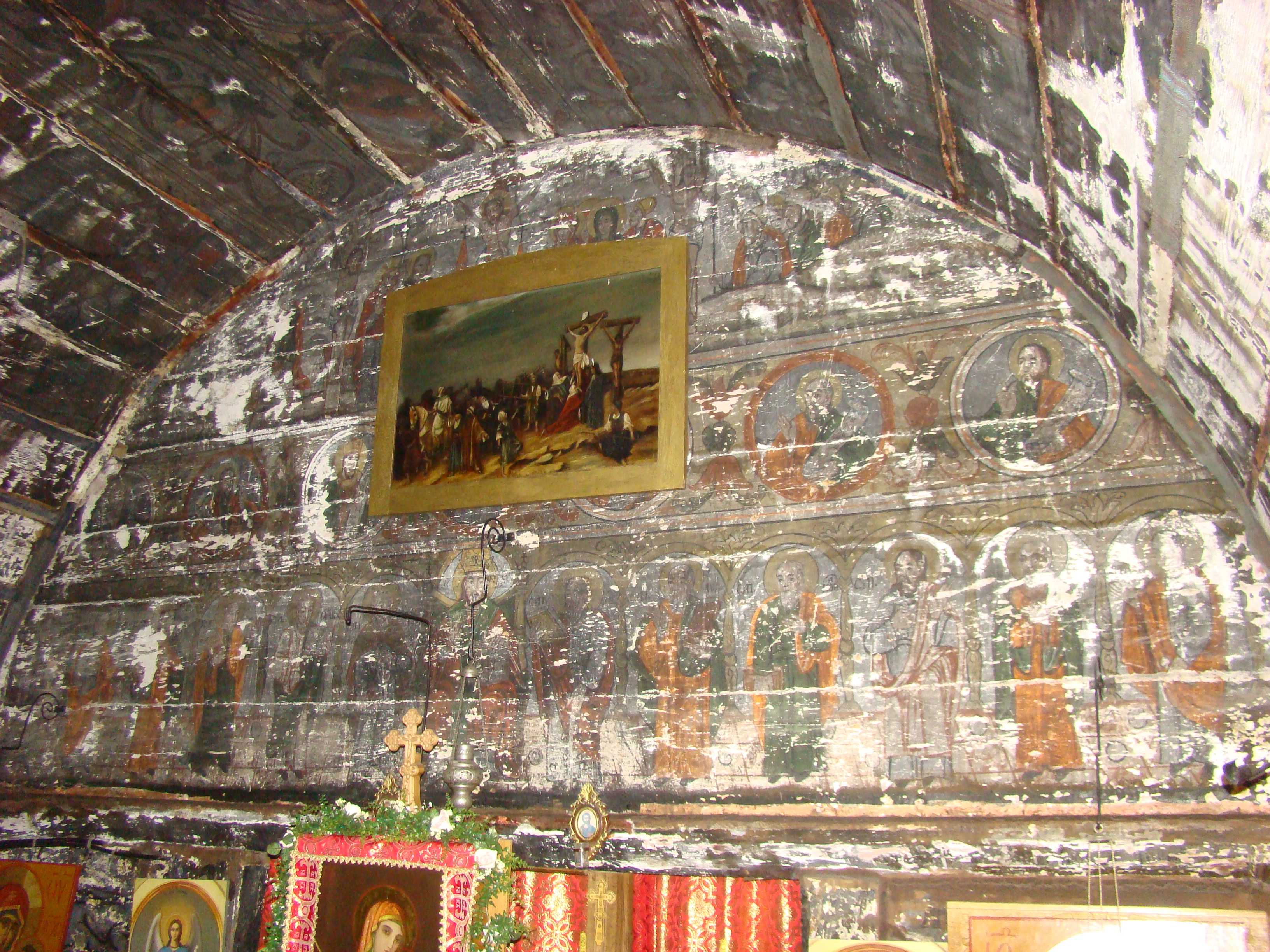 Biserica de lemn "Adormirea Maicii Domnului" a mănăstirii Bic, strămutată din satul Stâna